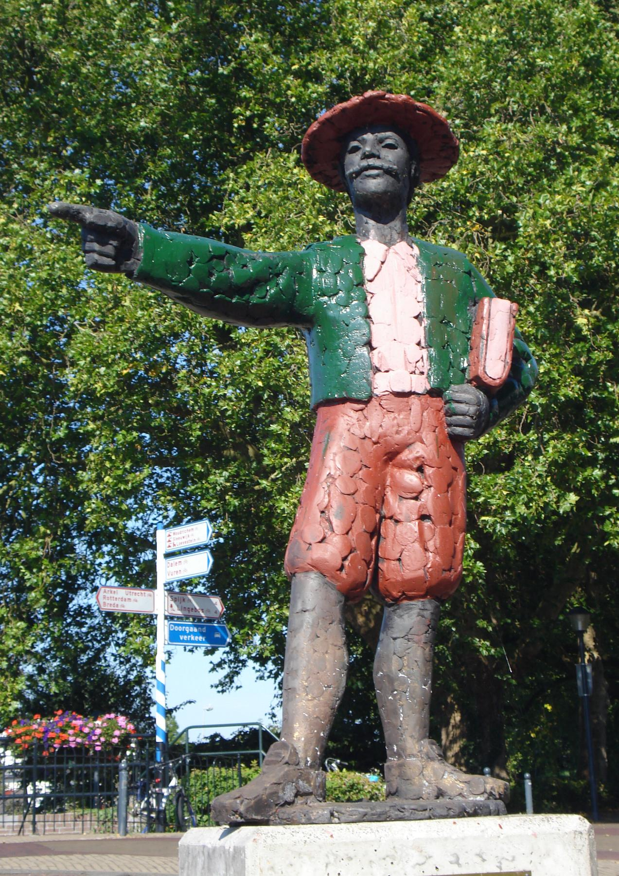 Gorinchem, Havendijk bij Korenbrug. Kunstwerk "Hendrick Hamel" van Jaap Hartman. The Netherlands. The photographical reproduction of this work is covered under the article 18 of the Dutch copyright law, which states that “it is not an infringement of copyright to reproduce and publish pictures of a work, as meant in article 10, first paragraph, under 6°[1] or of an architectural work as meant in article 10, first paragraph, under 8°[2], which are made to be permanently located in a public place, as long as the work is depicted as it is located in the public space. Where incorporation of a work in a compilation is concerned, not more than a few of the works of the same author may be included”. [1] drawings, paintings, works of architecture and sculpture, lithographs, engravings and the likes [2] drafts, sketches and three-dimensional works relating to architecture, geography, topography or other sciences Note that photographs are not included in Item 6. They are separately listed at Item 9 and are therefore not covered by FOP. See COM:CRT/Netherlands#Freedom of panorama for more information. .